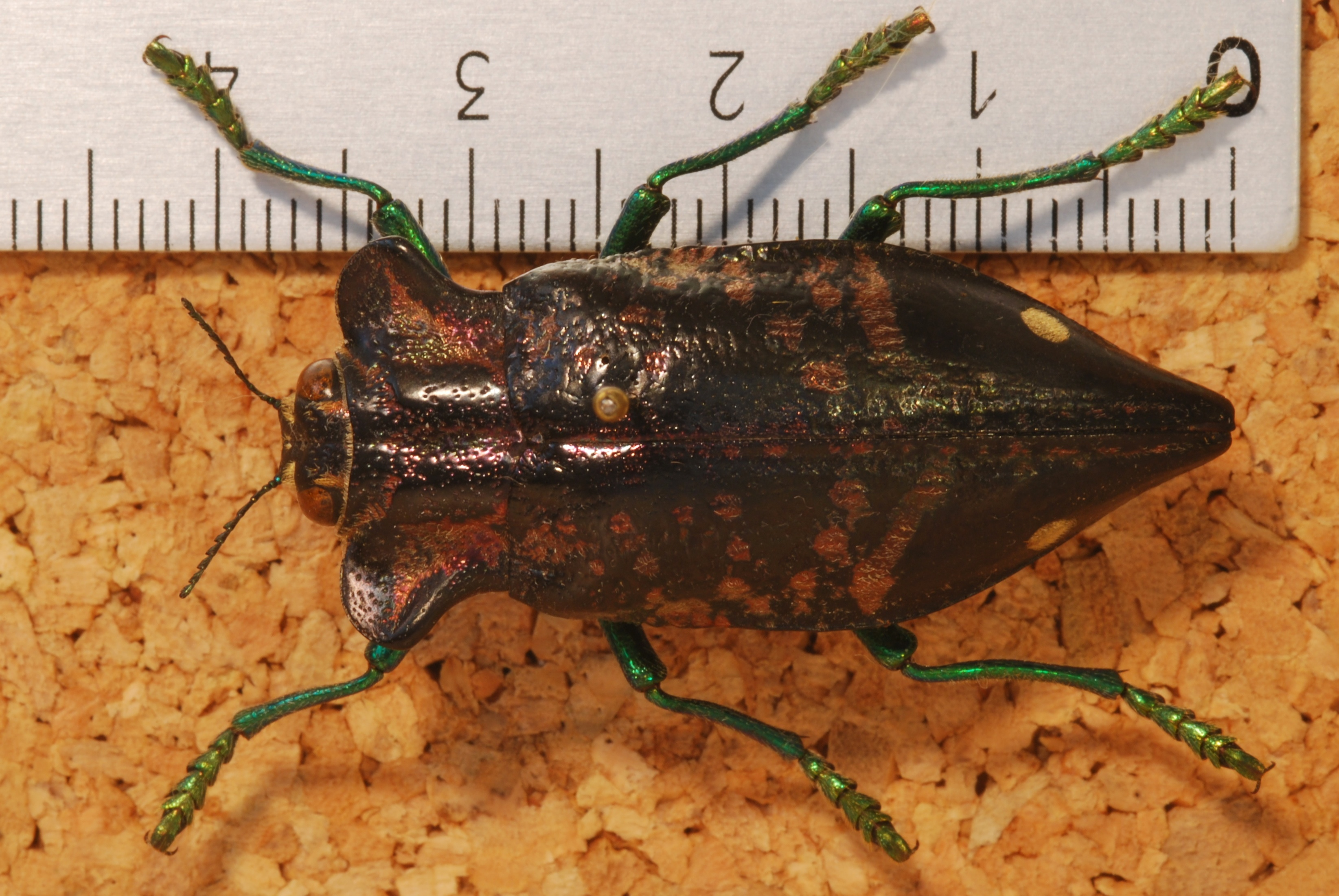 Ambatondrazaka, MADAGASCAR